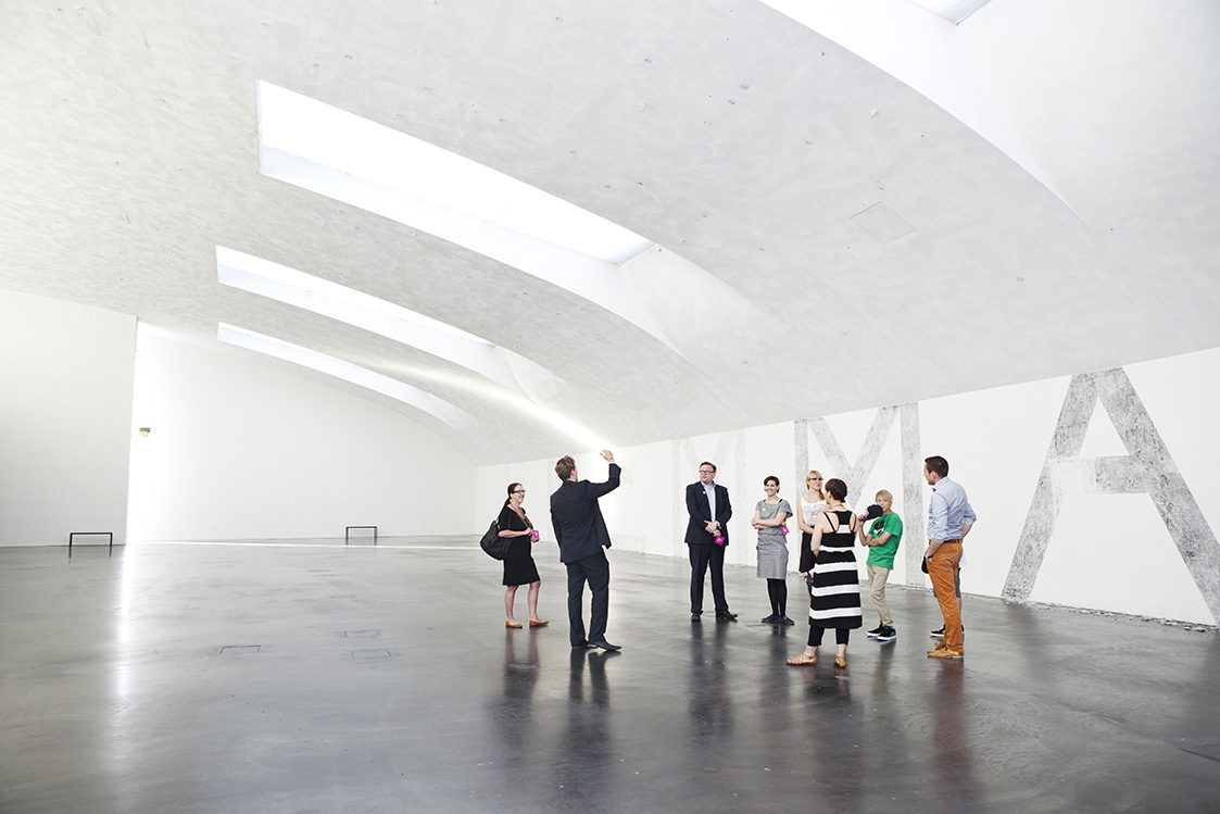 Kiasma, opastettu kierros, 5. kerros ; guided tour, 5th floor